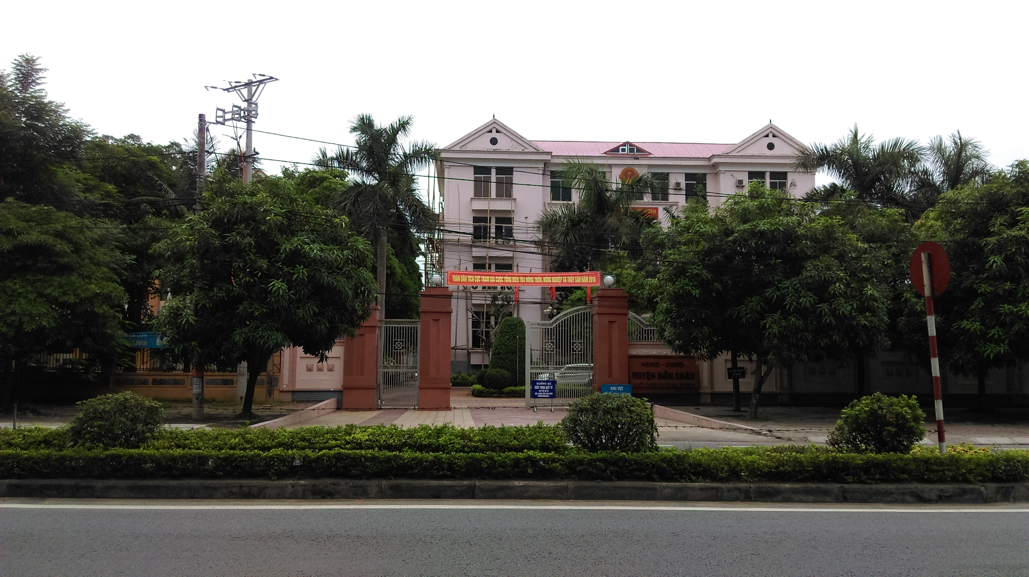 UBND huyện Diễn Châu, Nghệ An